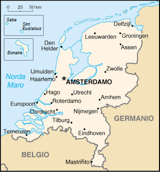 update naar aanleiding van de staatkundige hervormingen binnen het Koninkrijk der Nederlanden van oude kaart van Nederland, afkomstig uit het CIA World Factbook en vertaald door tzzzpfff